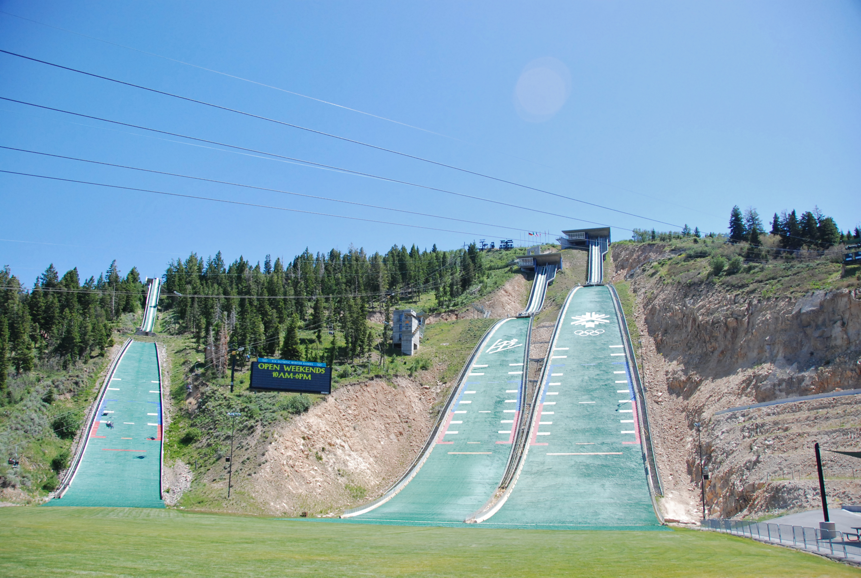 Ski jumping hill at utah olympic park, park cityPark City 406.jpg